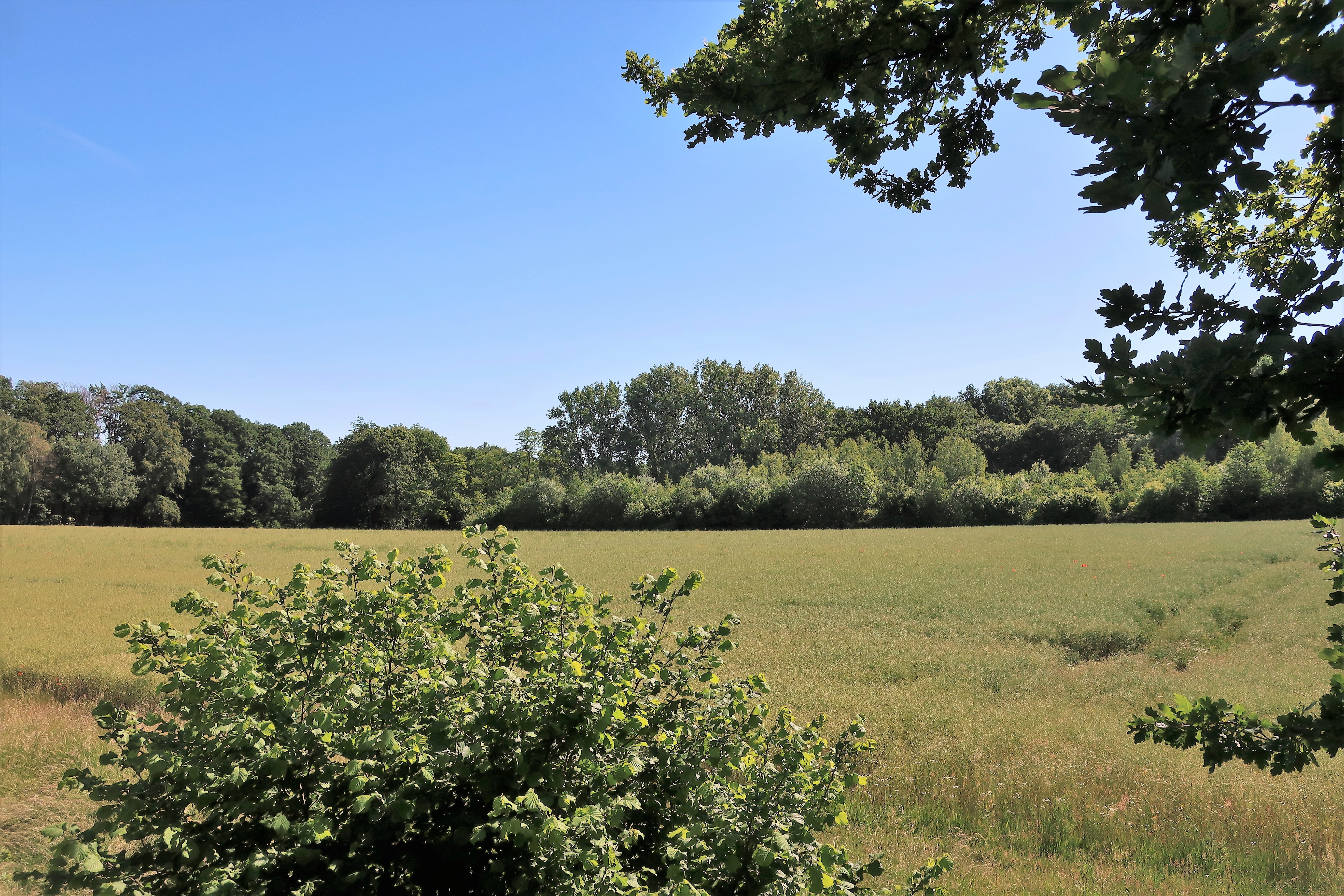 Geschützter Landschaftsbestandteil 1.4.2.5 „Kumschedebach“ in Hagen-Garenfeld, östlich der Villigster Straße, gelegen hinter dem Feld. Es handelt sich um den Grenzbach zur Stadt Schwerte mit naturnah mäandrierendem Bachlauf und bodenständigem Laubwald (Erlen-Eschenwald).